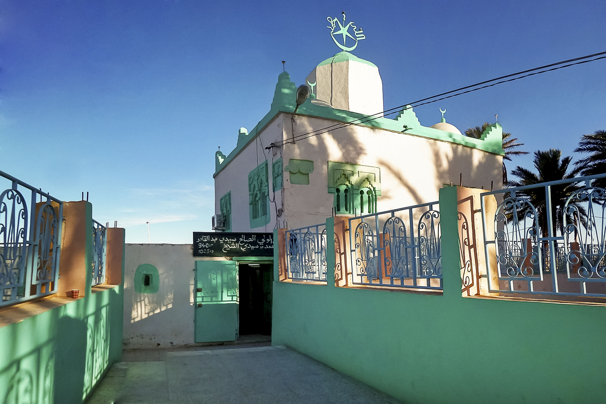 Mausolée de Sidi Abdelkader Ben Mohamed (Sidi Cheikh) ضريح سيدي عبد القادر بن محمد (سيدي الشيخ)ا El Abiodh Sidi Cheikh, wilaya d'El Bayadh الابيض سيدي الشيخ، ولاية البيض